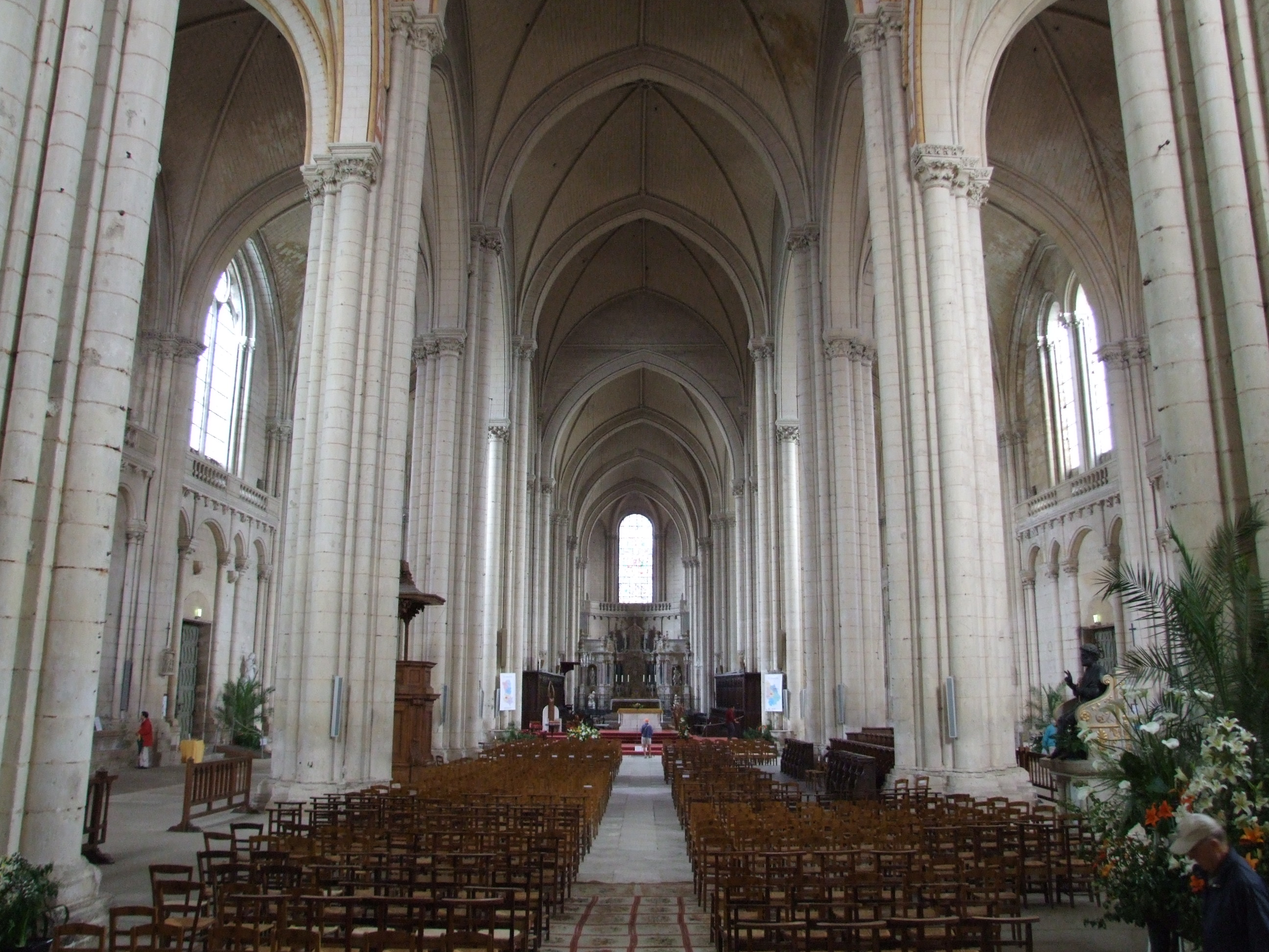 Cathédrale Saint-Pierre de Poitiers, Poitiers, Poitou-Charentes, FRANCE